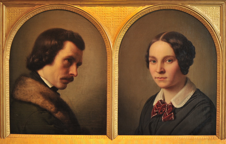 Joseph und Berta Keller, Porträt, Gemälde von Franz Ittenbach